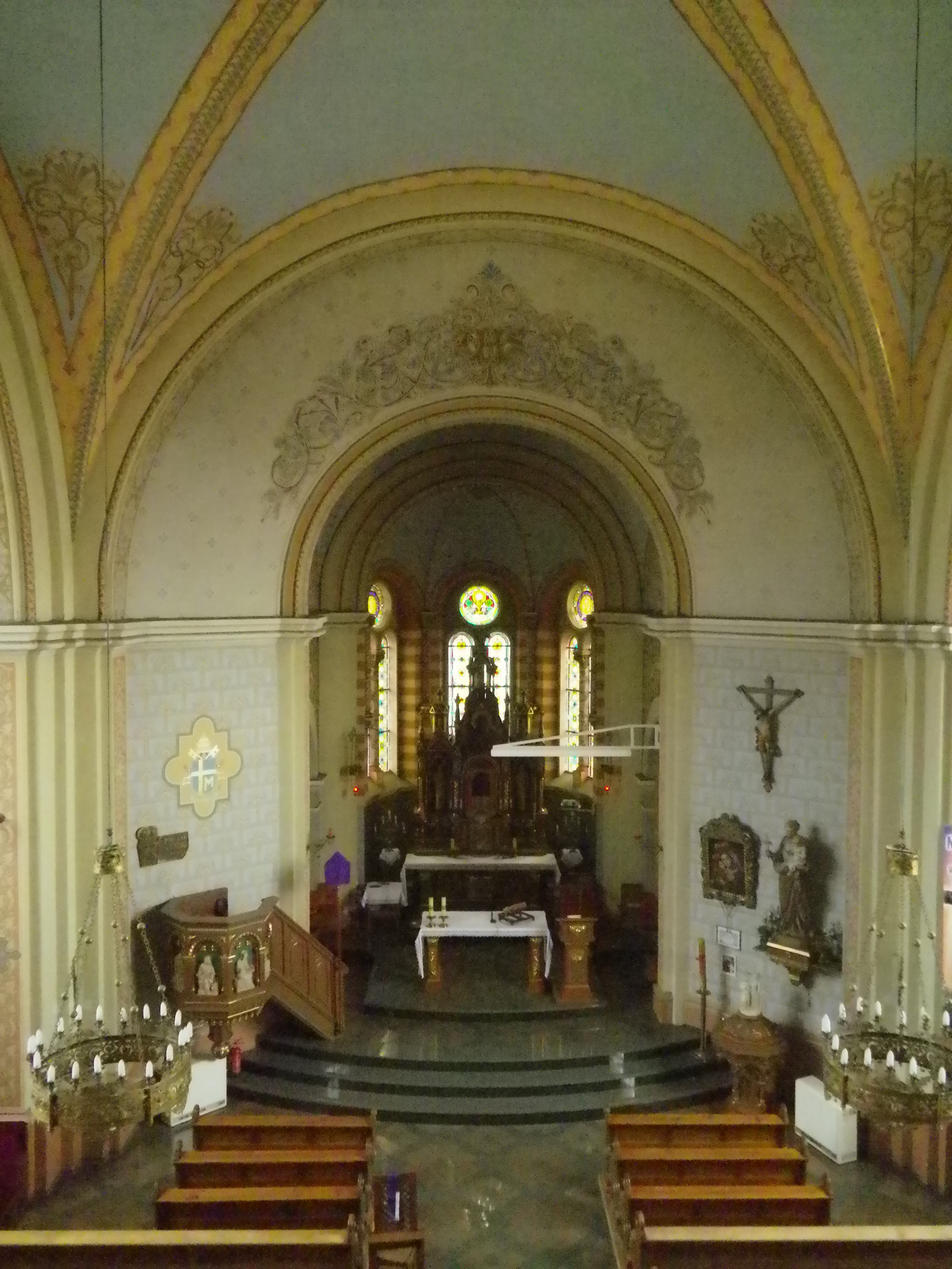 Wnętrze kościoła w Ptaszkowie (woj. wielkopolskie, Polska); marzec 2015